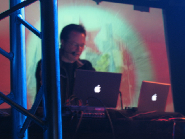 Vasily Shumov live with CENTER in Moscow, November 17, 2006 / Василий Шумов на концерте «Центра» в Москве, 17.11.2006.